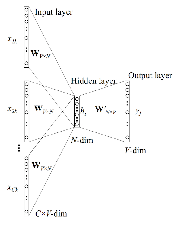 cbow reseau neurones